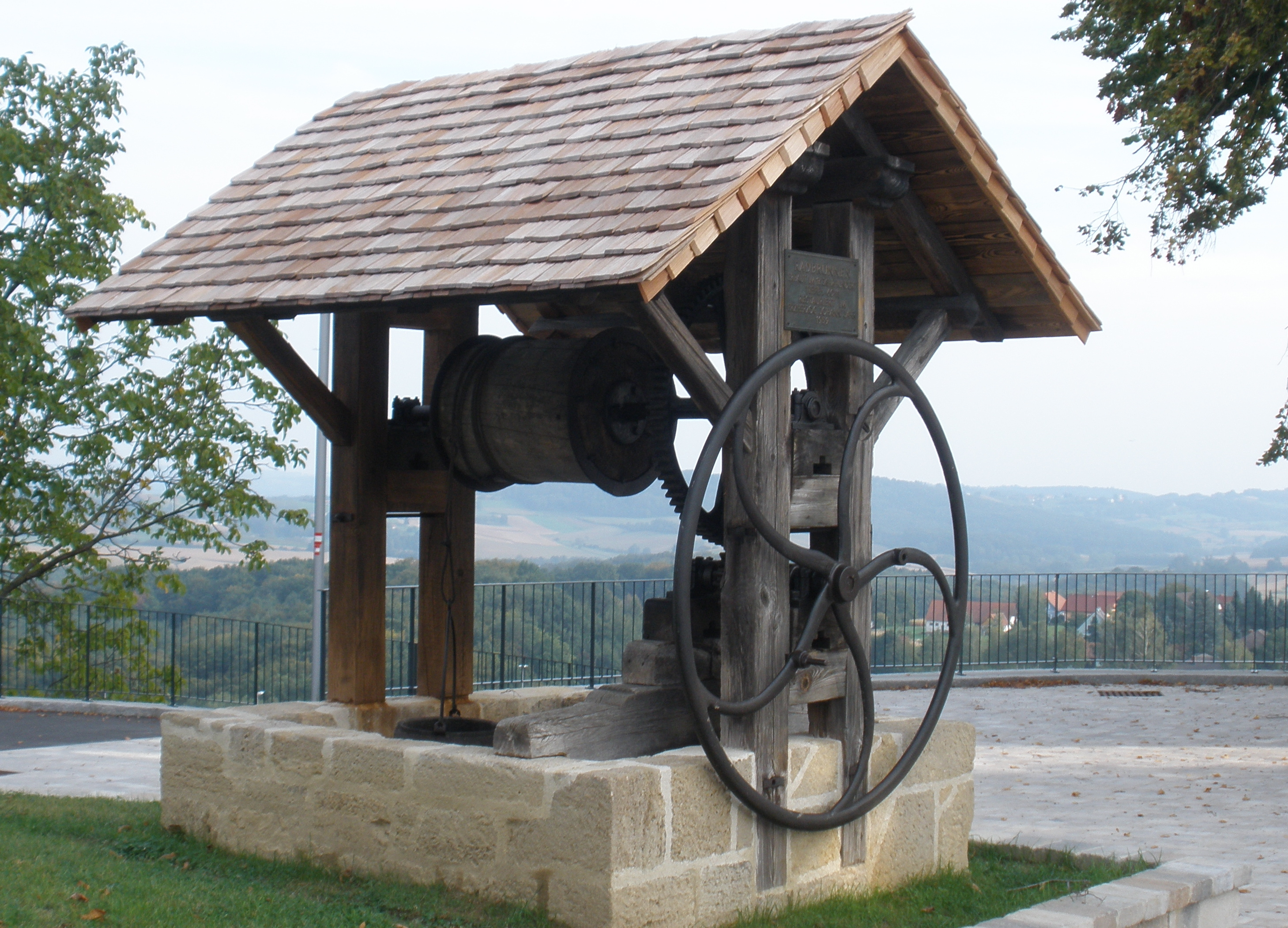 Der Radbrunnen in St. Anna am Aigen stammt aus dem 17. Jahrhundert und weist eine Brunnentiefe von 60 Metern auf.